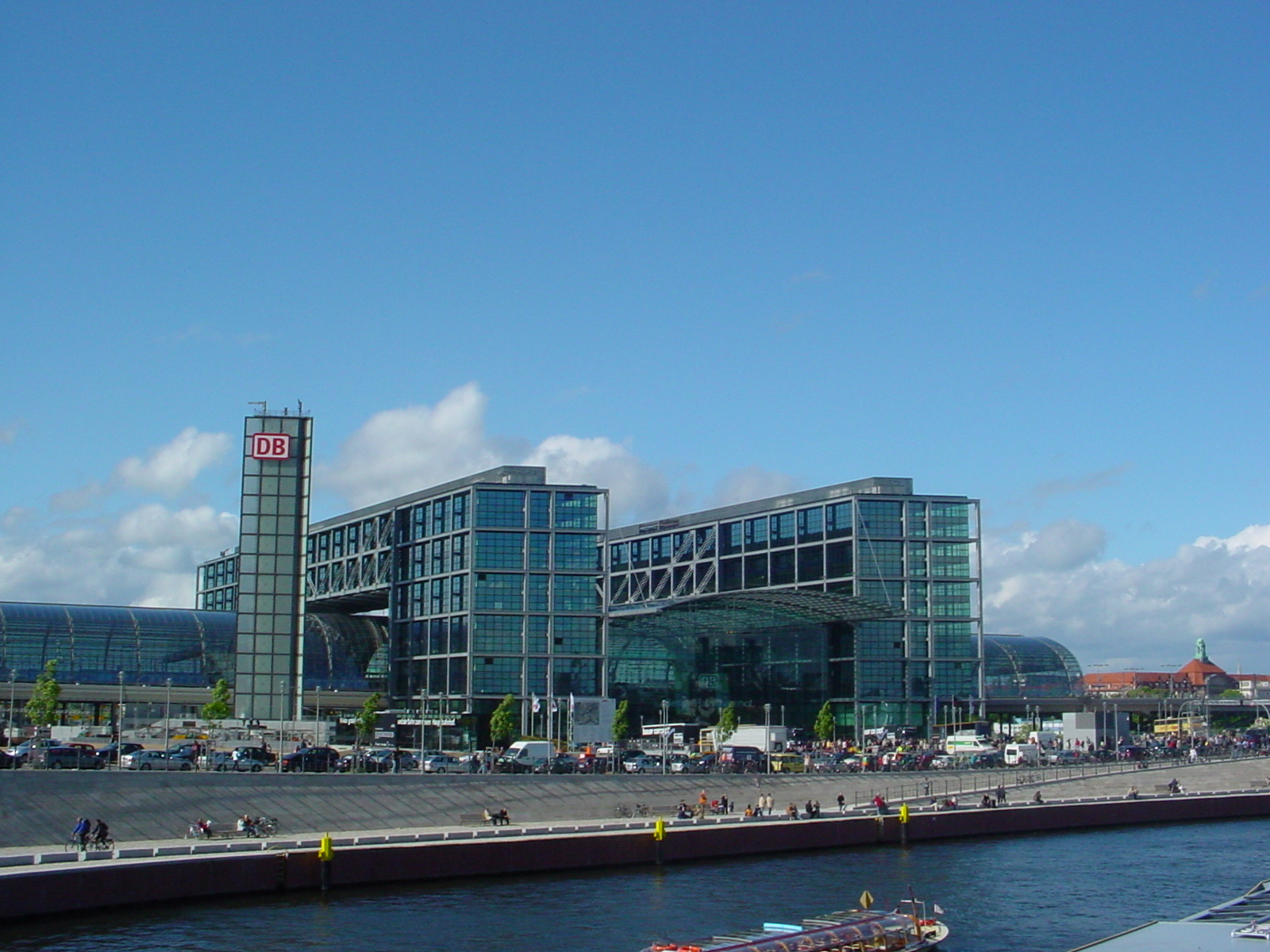 Berlin Hauptbahnhof